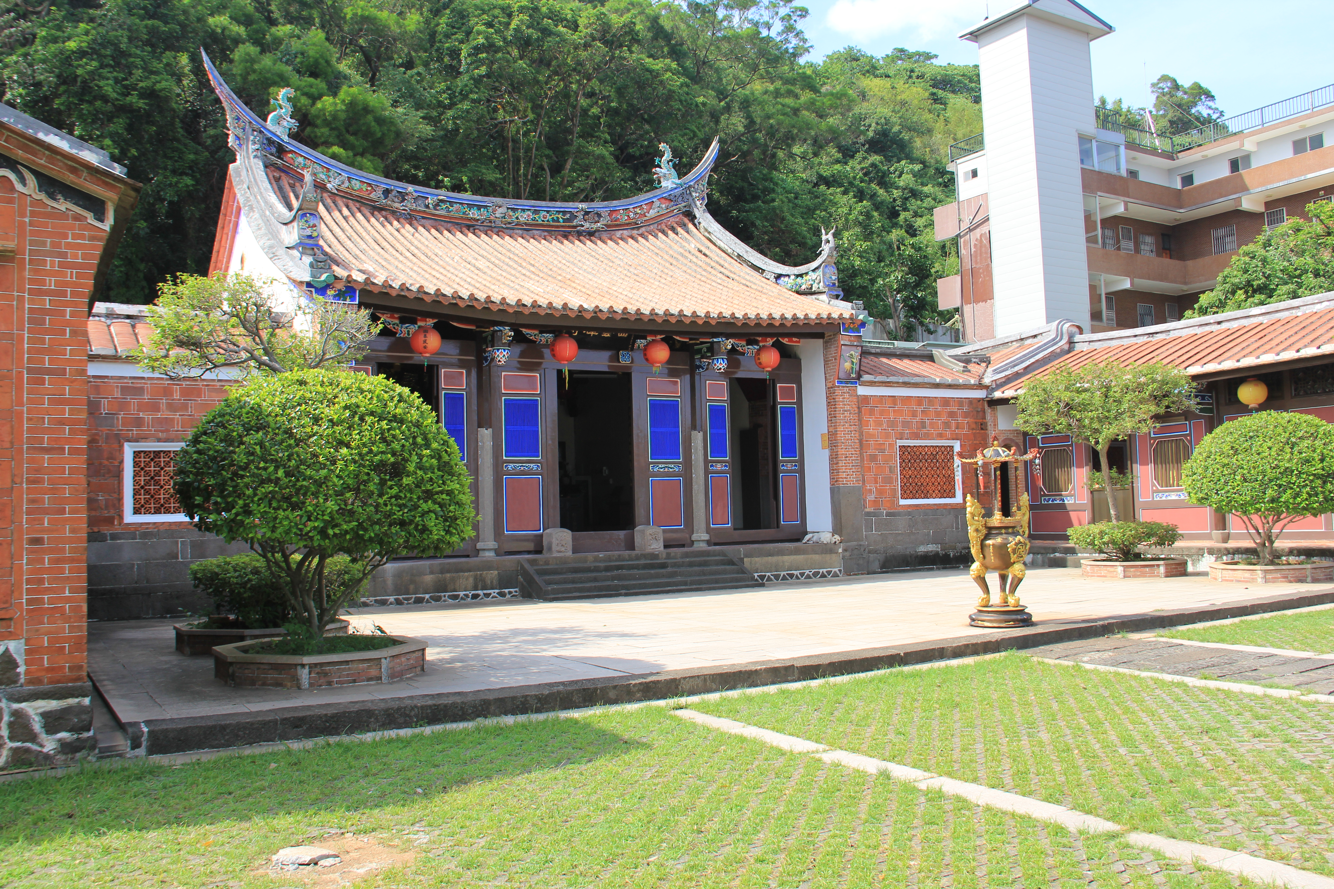 五股西雲寺側面照